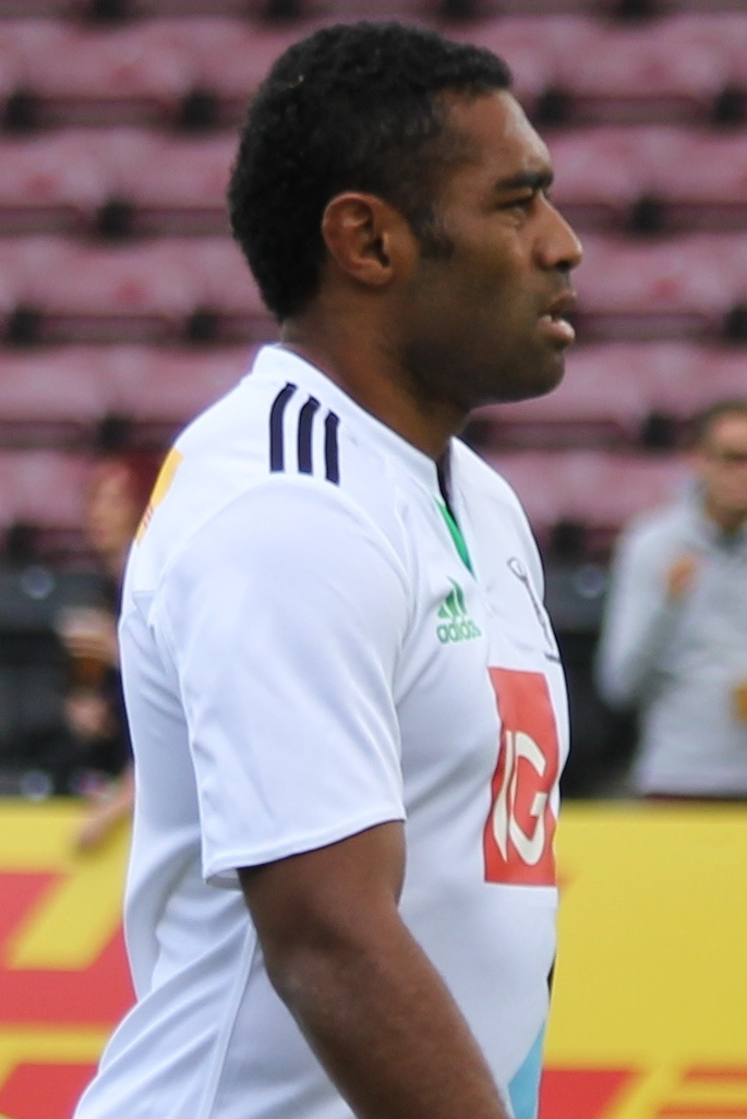 Aseli Tikoirotuma